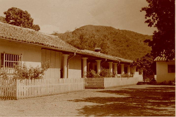 Vista de la casa de la Hacienda Mozanga en 1965.